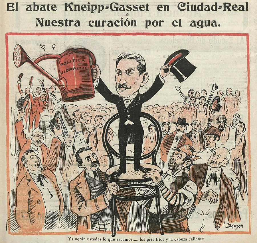 El abate Kneipp-Gasset en Ciudad Real - Nuestra curación por el agua, en la revista satírica española Gedeón.